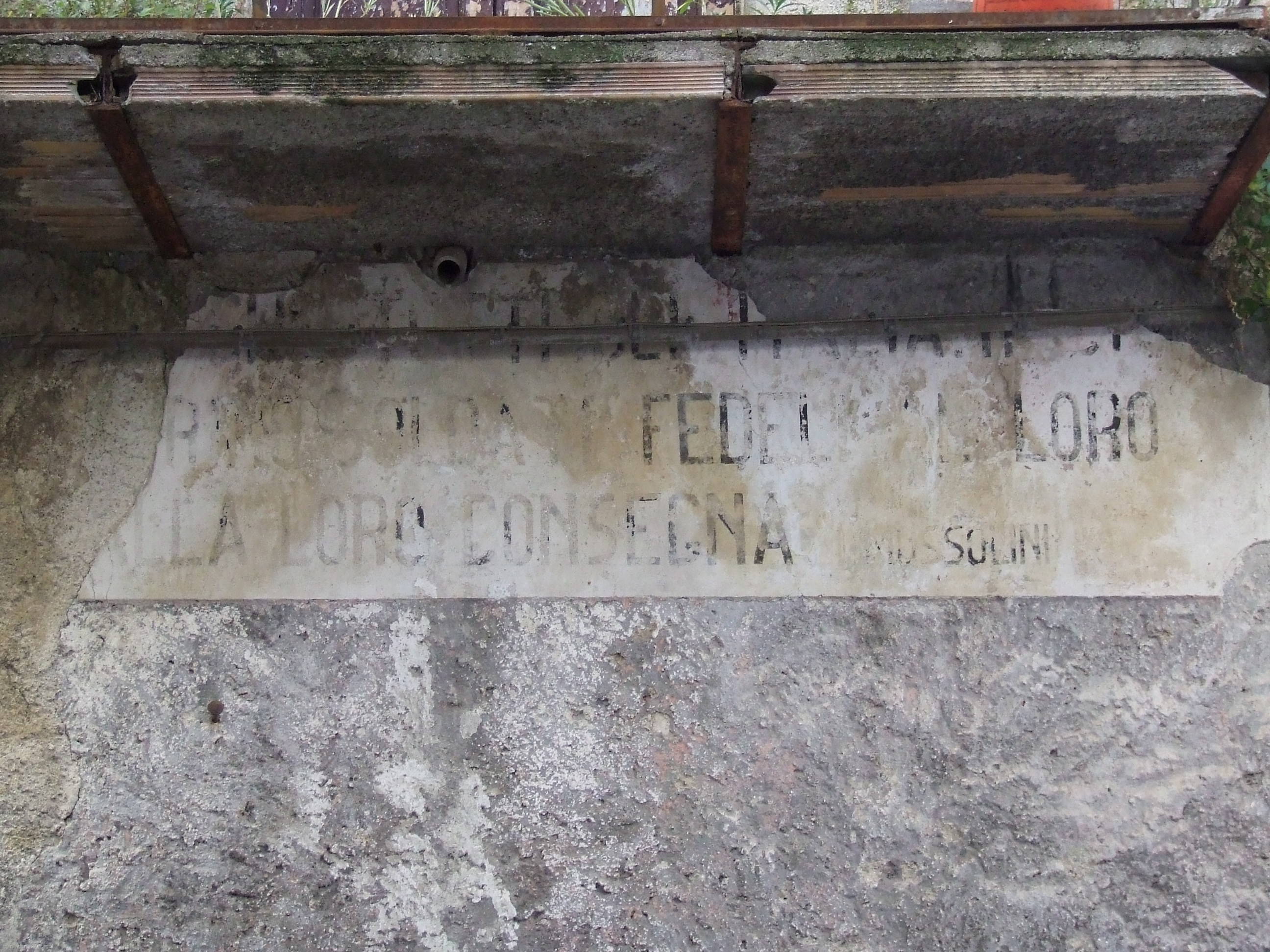 Motto fascista di Via Capolanzi in Caggiano, parte della frase di Benito Mussolini "Bisogna diventare migliori, bisogna che tutti gli Italiani si considerino soldati fedeli al loro posto, alla loro consegna. Mussolini" Nella scritta parzialmente cancellata si legge: [...] CHE TUTTI GLI ITALIANI SI [...] [...] RINO SOLDATI FEDELI AL LORO [...] [...] ALLA LORO CONSEGNA mussolini